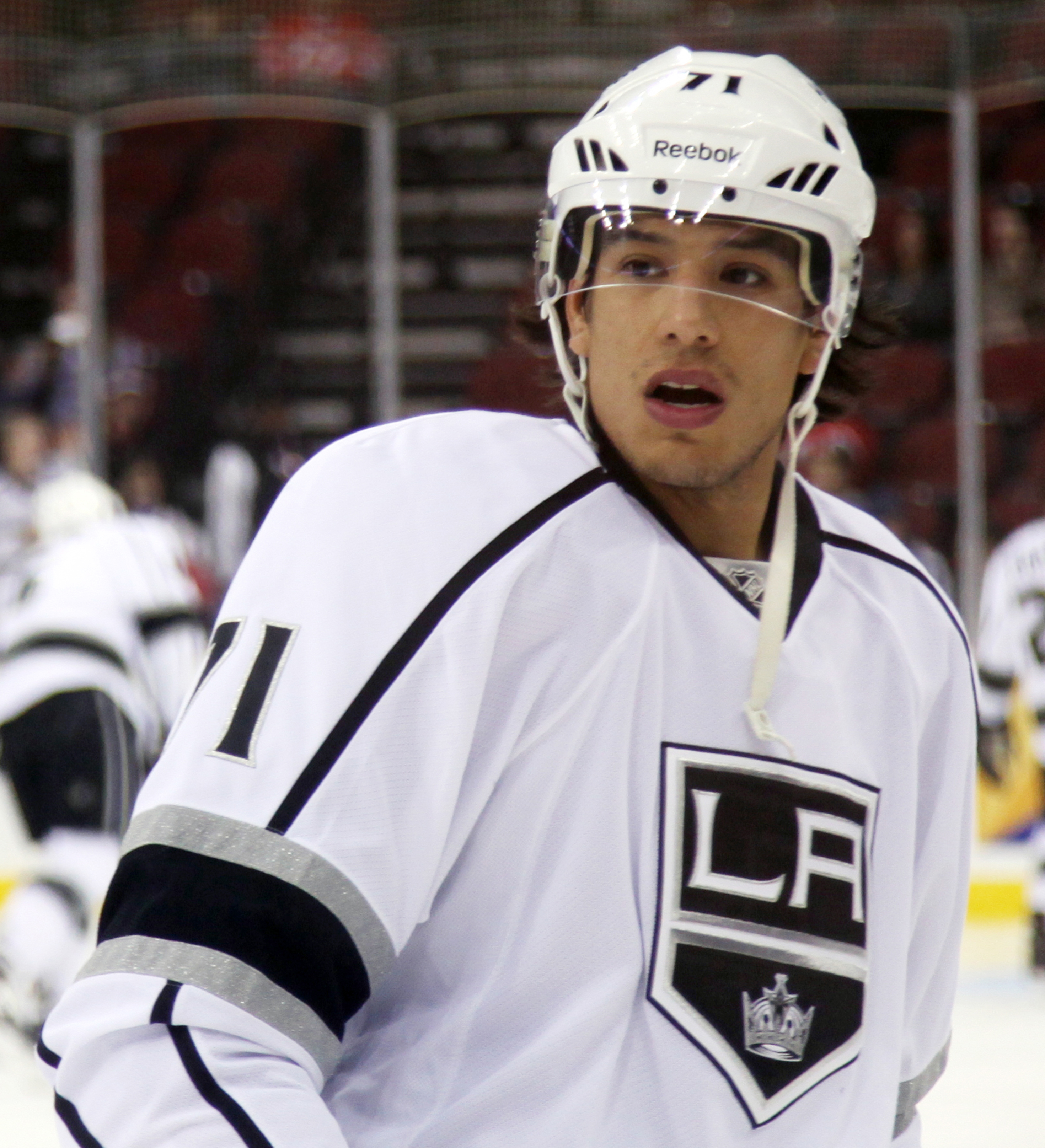 Nolan in 2013.